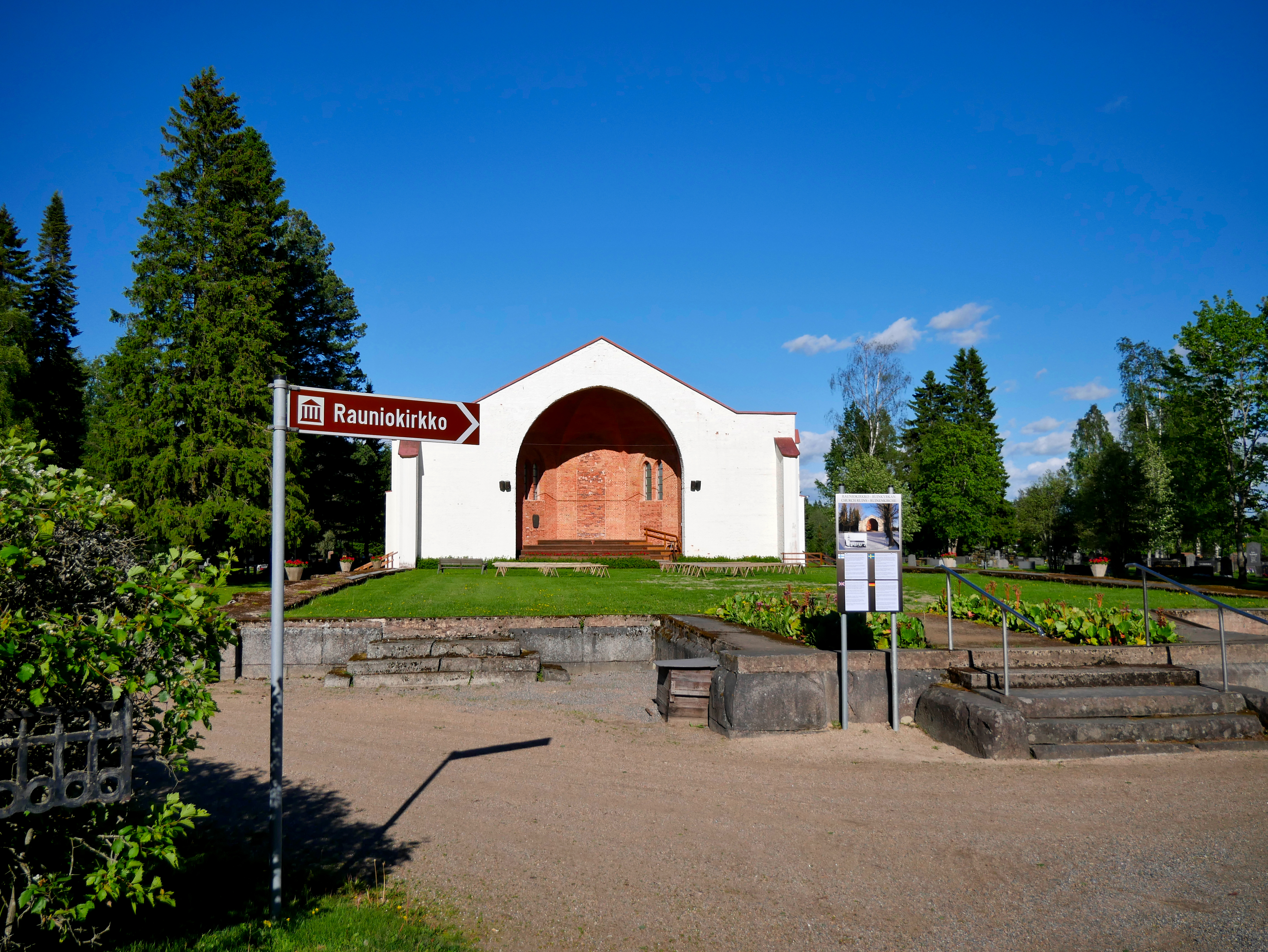 Teuvan rauniokirkko.